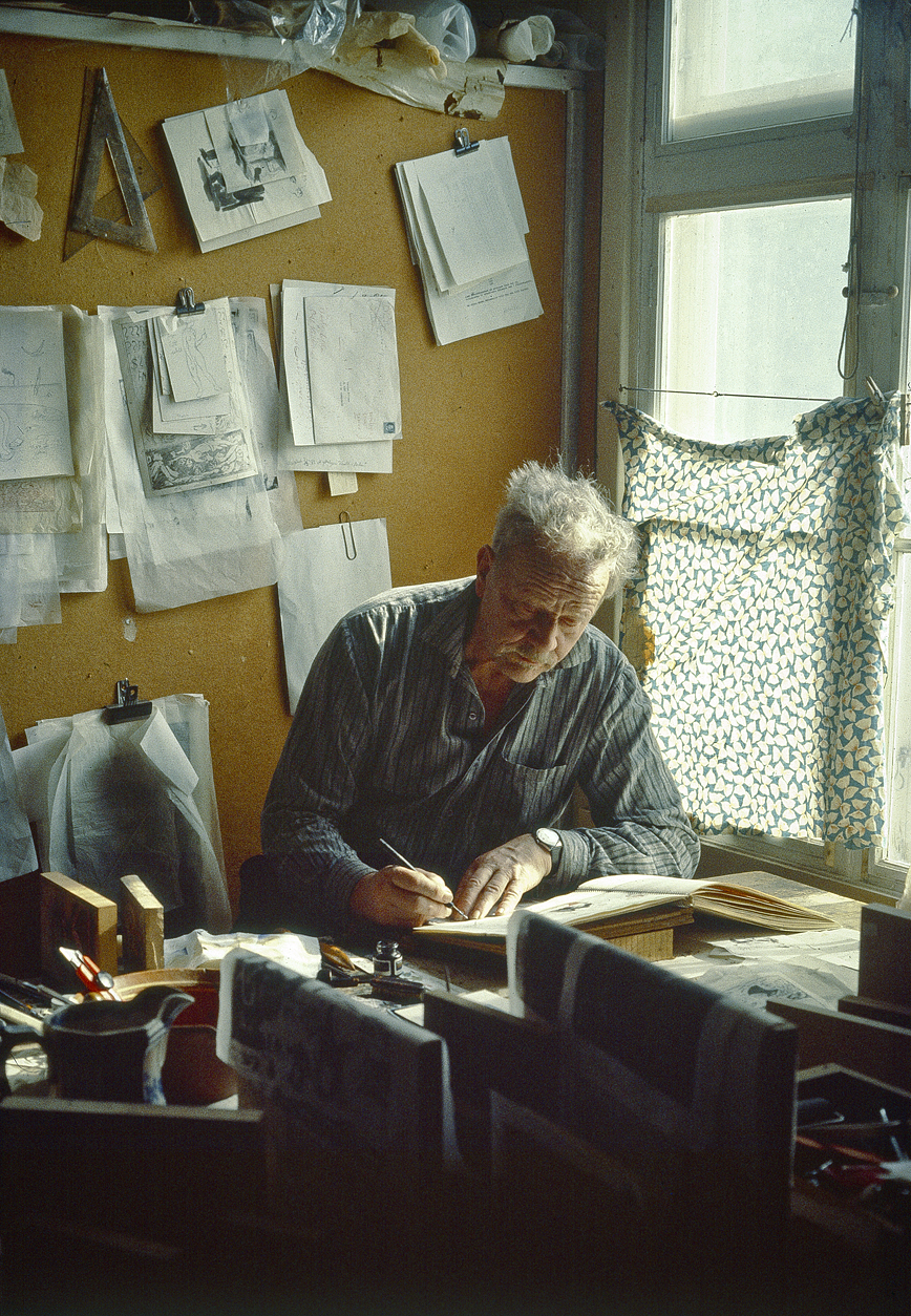 Studio 1985